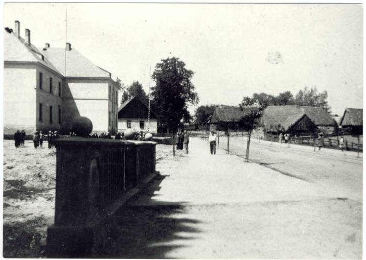 Truskolasy - budynek szkoły oddany w roku 1929, w tle nieistniejący już budynek z okresu zaborów